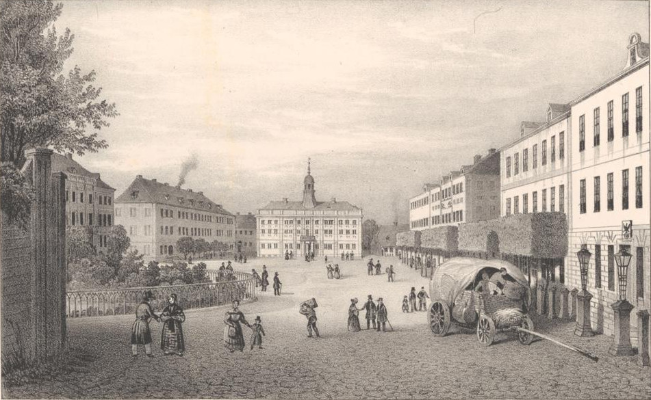 Friedrich Wilhelms-Platz in Elbing, Lithographie : 20 x 12 cm, Heinrich Wilhelm Teichgräber